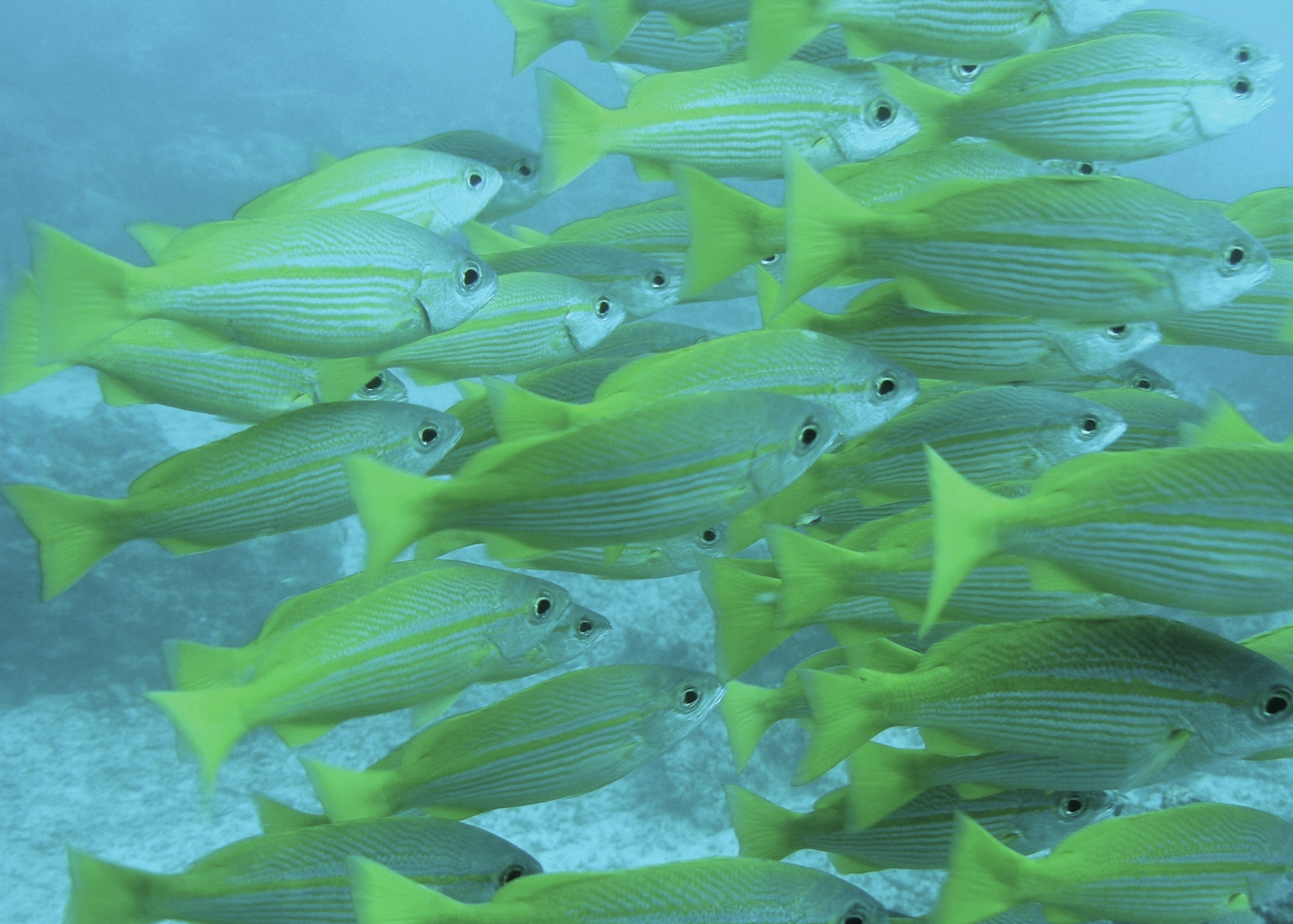 Image of Bigeye snapper. Lutjanus lutjanus. Taken at Sipadan, Borneo, Malaysia.